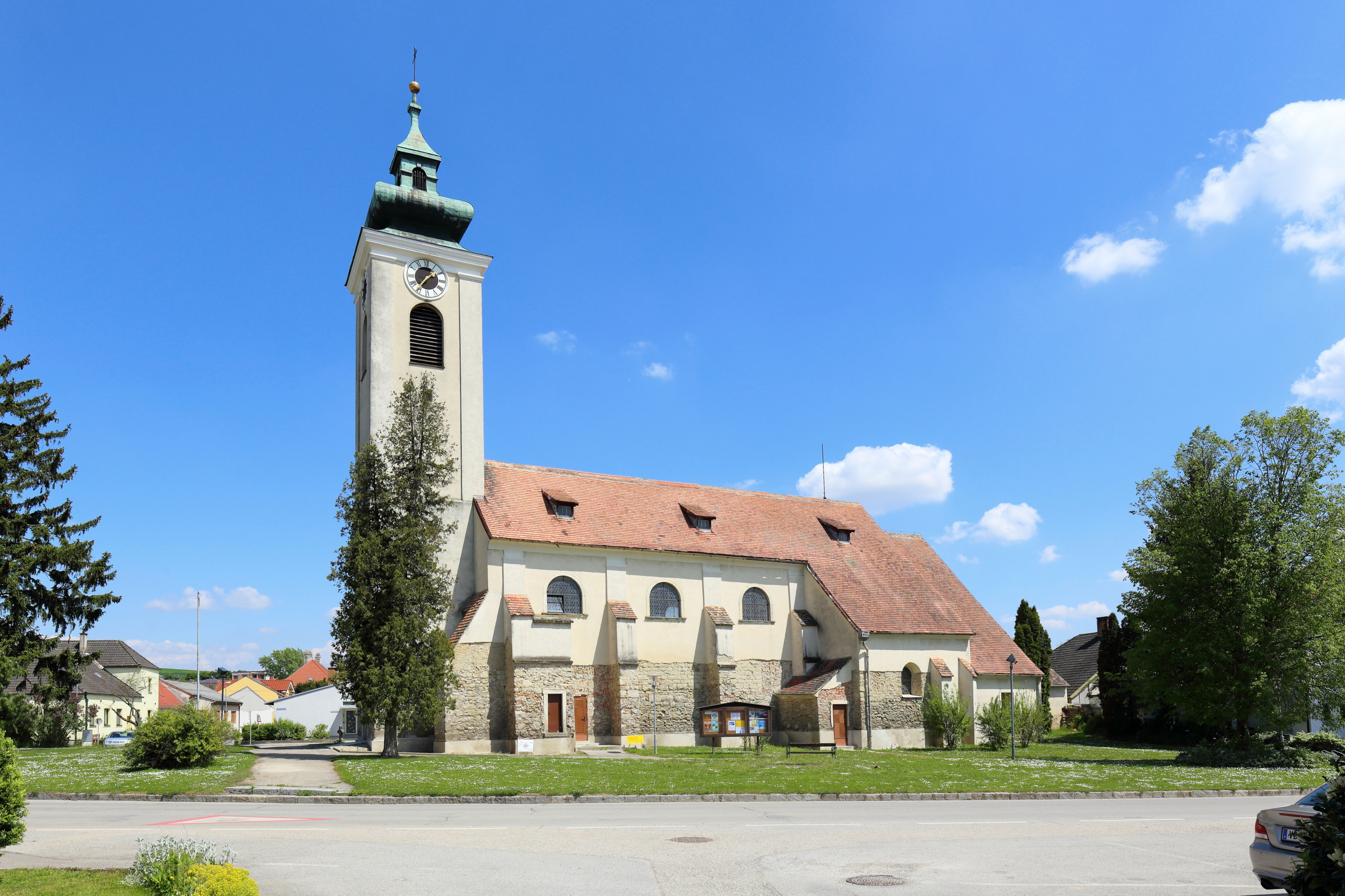 Westansicht der römisch-katholischen Pfarrkirche hl. Nikolaus in der niederösterreichischen Marktgemeinde Großmugl.Eine im Kern gotische Saalkirche, die barockisiert wurde. Unter anderem wurde dabei das Langhaus erhöht. Die Marienkapelle, südseitig des Chores, wurde 1453 errichtet und 1835 erhöhte man den vorgestellte Westturm.